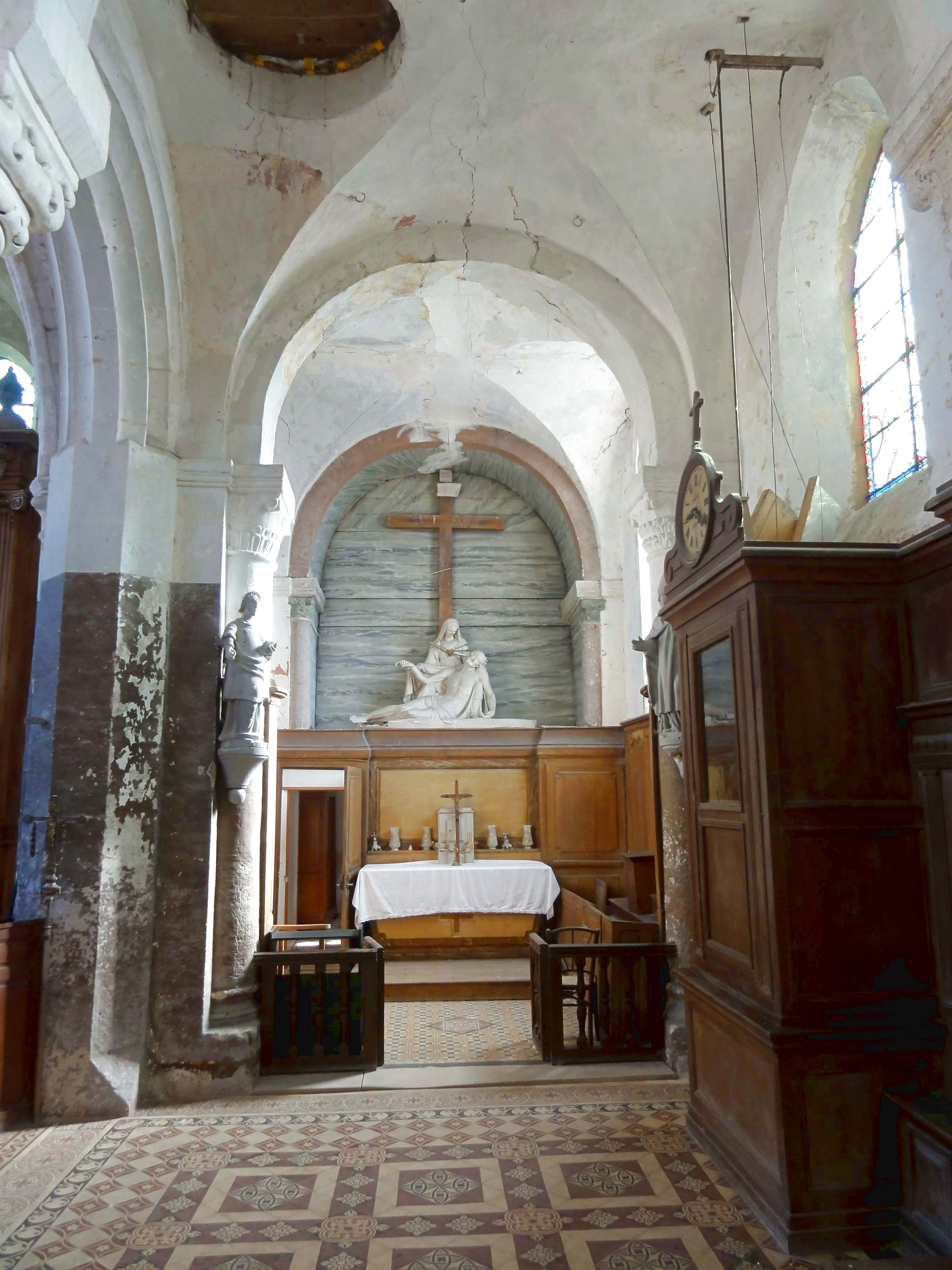 Intérieur de l'église - voir titre.